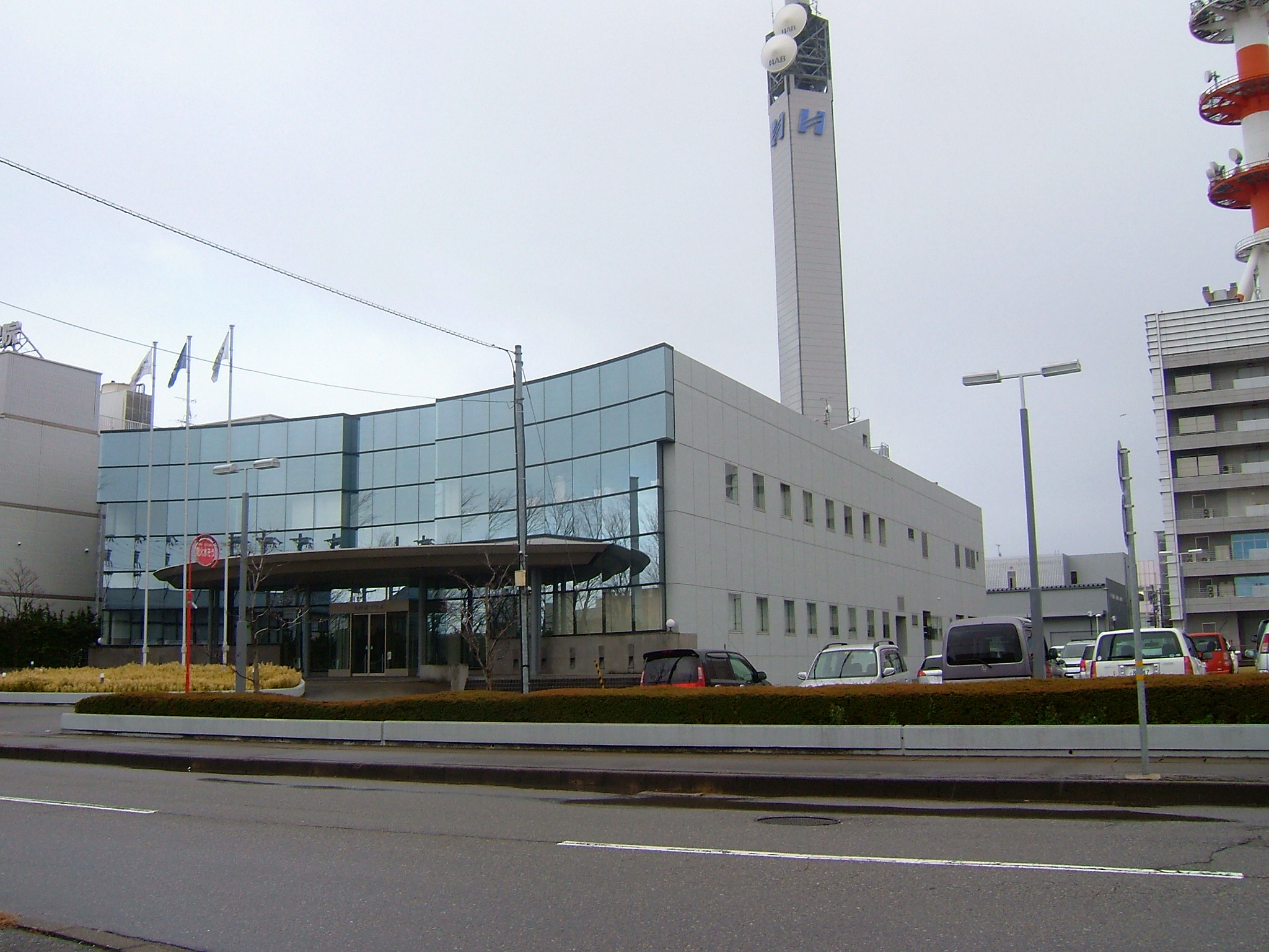 北陸朝日放送本社（石川県金沢市松島）